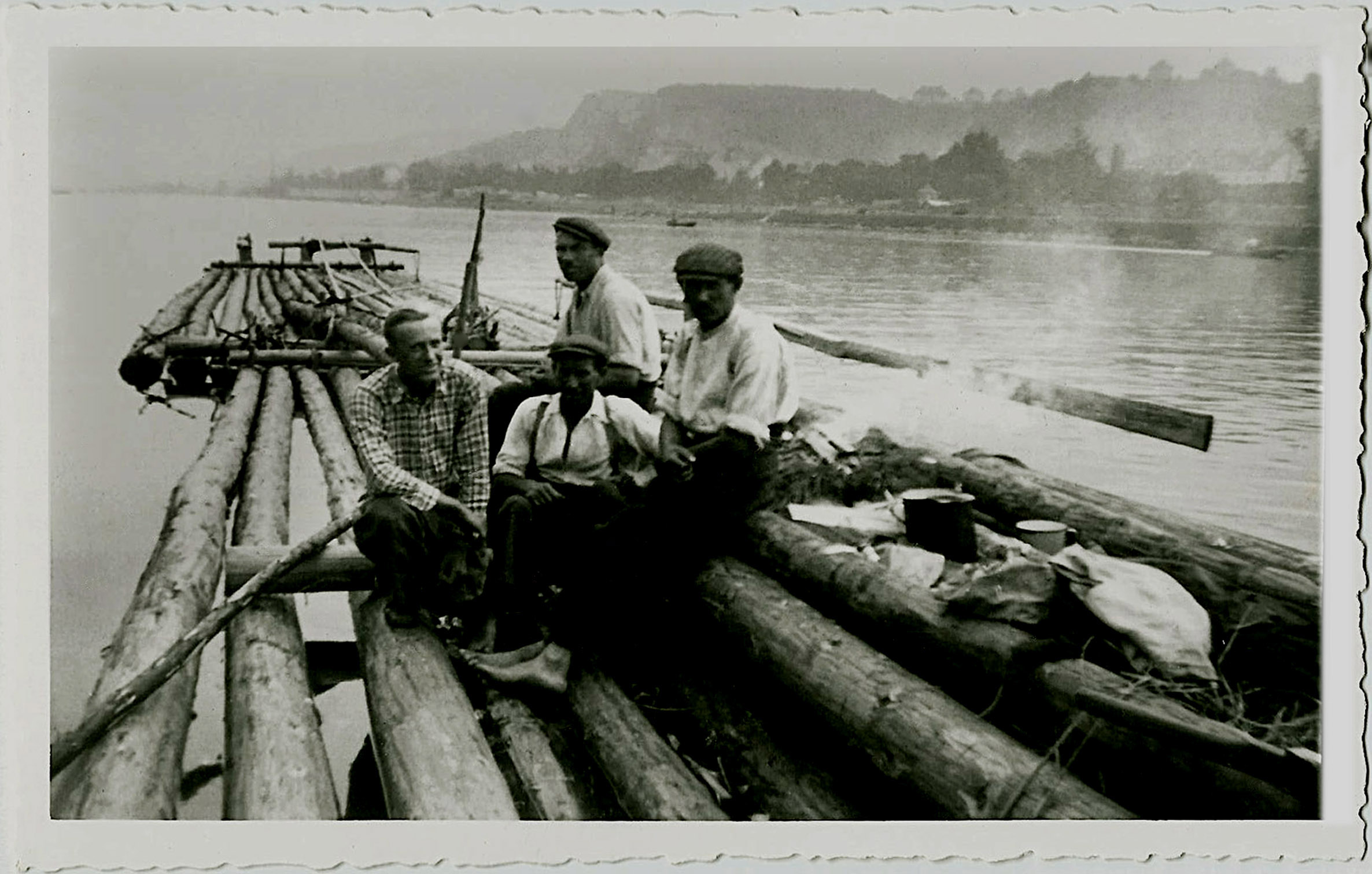 Voraři přijíždí do Prahy, v pozadí Branická skála